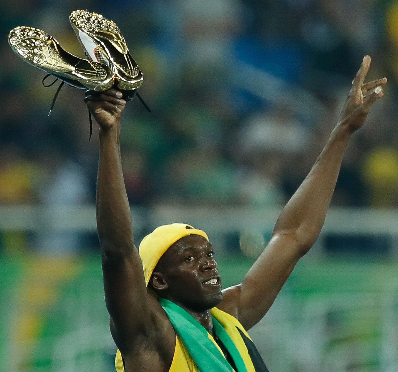 Rio de Janeiro - O jamaicano Usain Bolt, garantiu o ouro e fez história ao conquistar pela terceira vez o título de homem mais rápido do mundo nos 100 metros rasos em uma Olimpíada (Fernando Frazão/Agência Brasil).